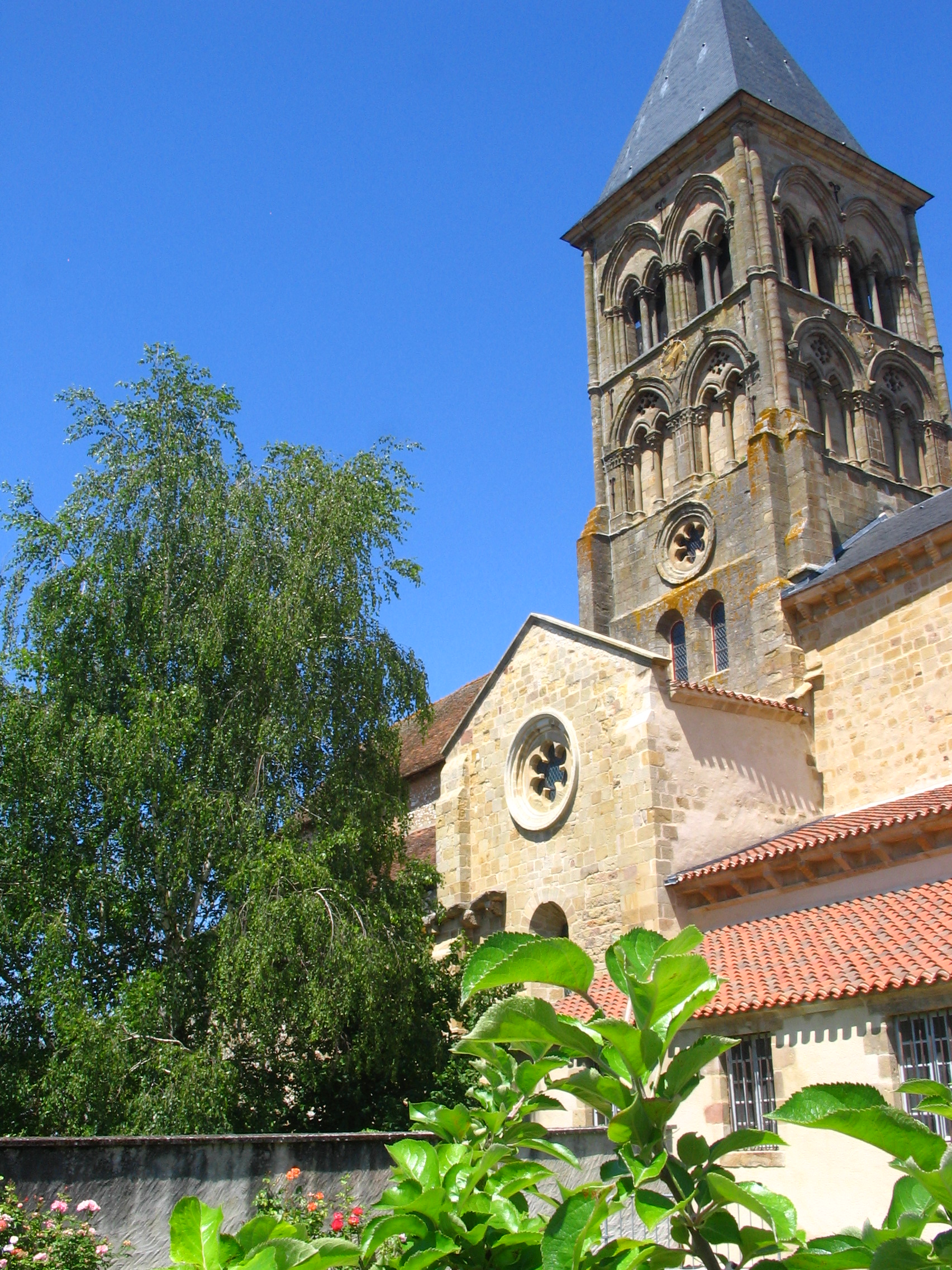 Eglise abbatiale de Saint-Menoux (03).